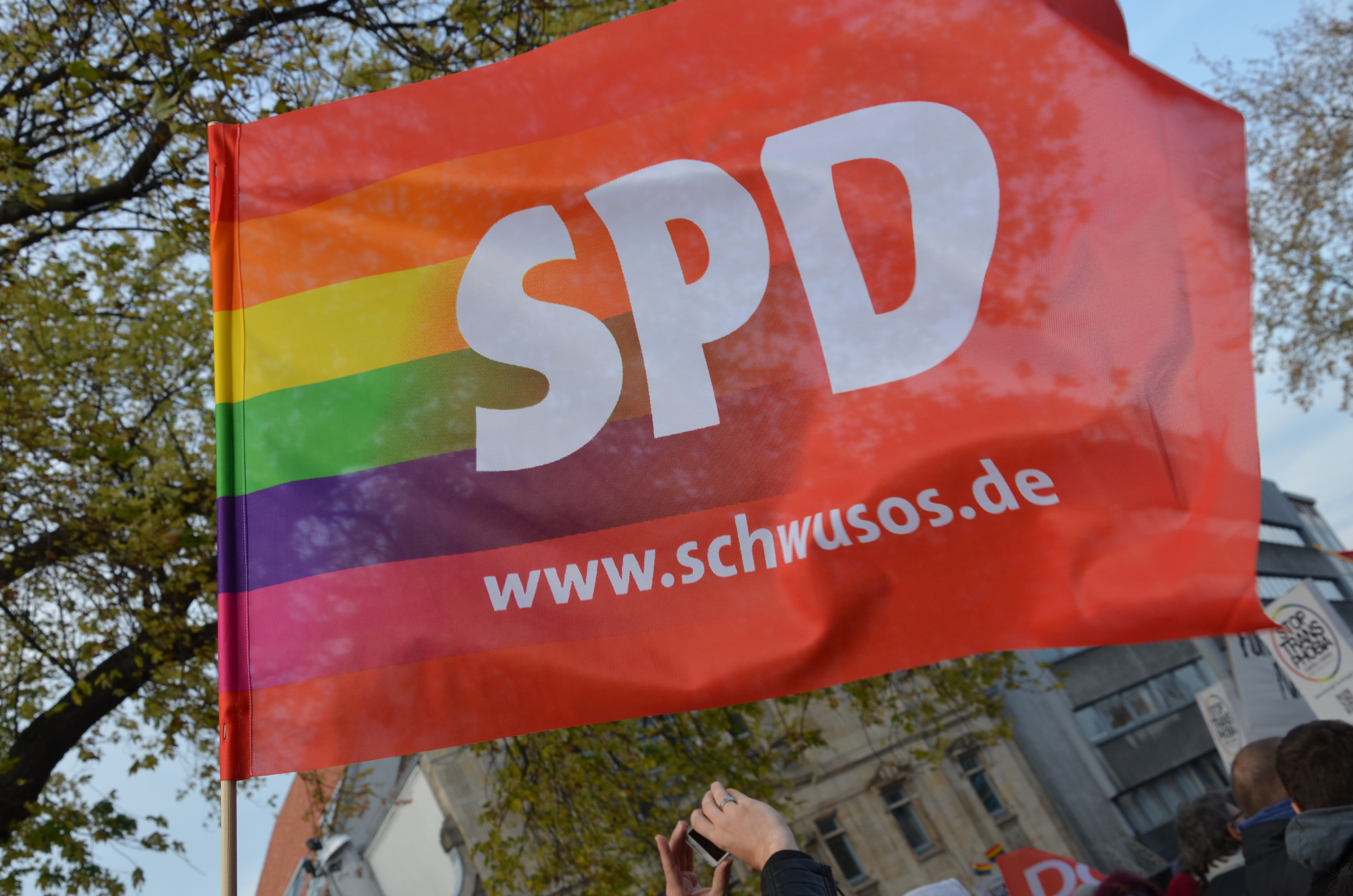 Zu der Kundgebung unter dem Motto Vielfalt statt Einfalt, zu der sich bundesweit mehr als 40 Organisationen, Gruppen und Einzelpersonen zusammengefunden haben, fand am 22. November 2014 auf dem Platz der Goseriede in Hannover eine bunte Kundgebung statt. Mehrere hundert Menschen hatten sich zusammengefunden mit dem Ziel, das Schwule, Lesben, Trans- und Intersexuelle Menschen zukünftig keine Ausgrenzung mehr erfahren, sondern in ihrer freien Persönlichkeitsentwicklung schon durch den Schulunterricht frühzeitig gefördert werden. Bereits am Vortag der Kundgebung hatte die Stadt Hannover den nahegelegenen Platz Am Steintor, auf dem am selben Tag eine weitere, sogenannte Demo für alle startete, zahlreiche Regenbogenfahnen hochgezogen als für alle sichtbares Zeichen der Bereicherungen des gemeinschaftlichen Zusammenlebens und -arbeitens vielfältiger Identitäten und Kulturen in der niedersächsischen Landeshauptstadt ...